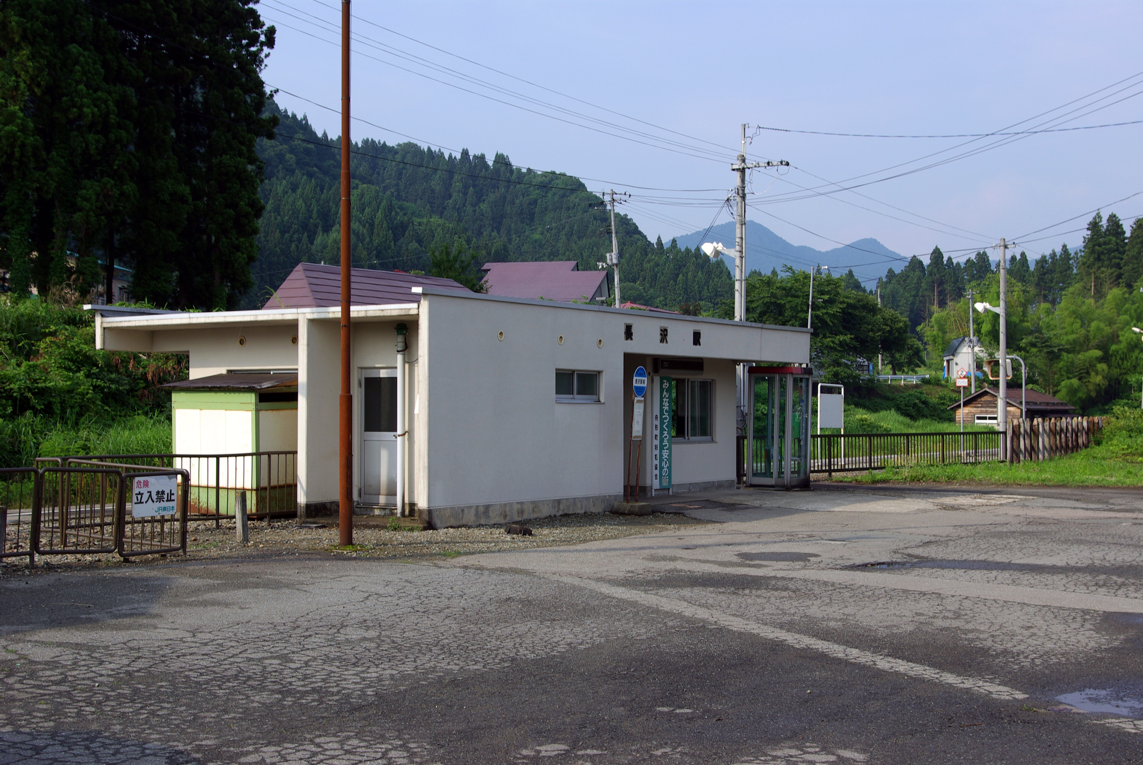 JR陸羽東線長沢駅